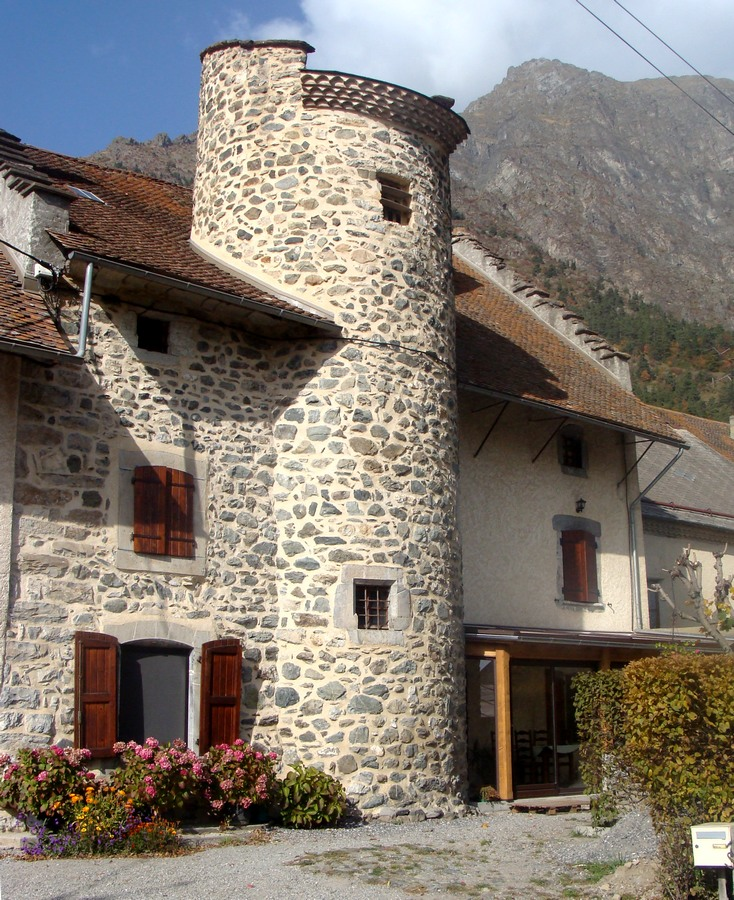 Hautes-Alpes, La Motte-en-Champsaur : Tour-pigeonnier rénové au coeur du village.